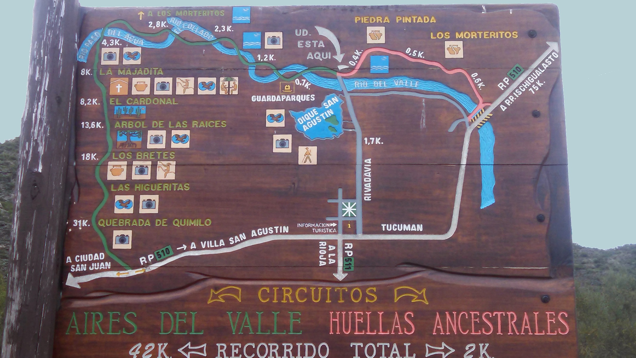 Indicador de circuitos de interés turístico en la Reserva de uso múltiple San Agustín - Departamento Valle Fértil - San Juan - Argentina